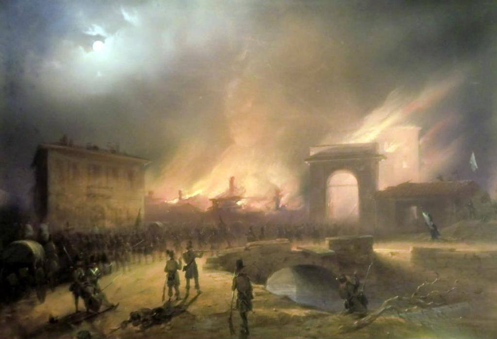 La ritirata degli austriaci dal dazio di Porta Tosa (oggi piazza Cinque Giornate) la notte del 22 marzo 1848 Tempera su carta di Carlo Bossoli